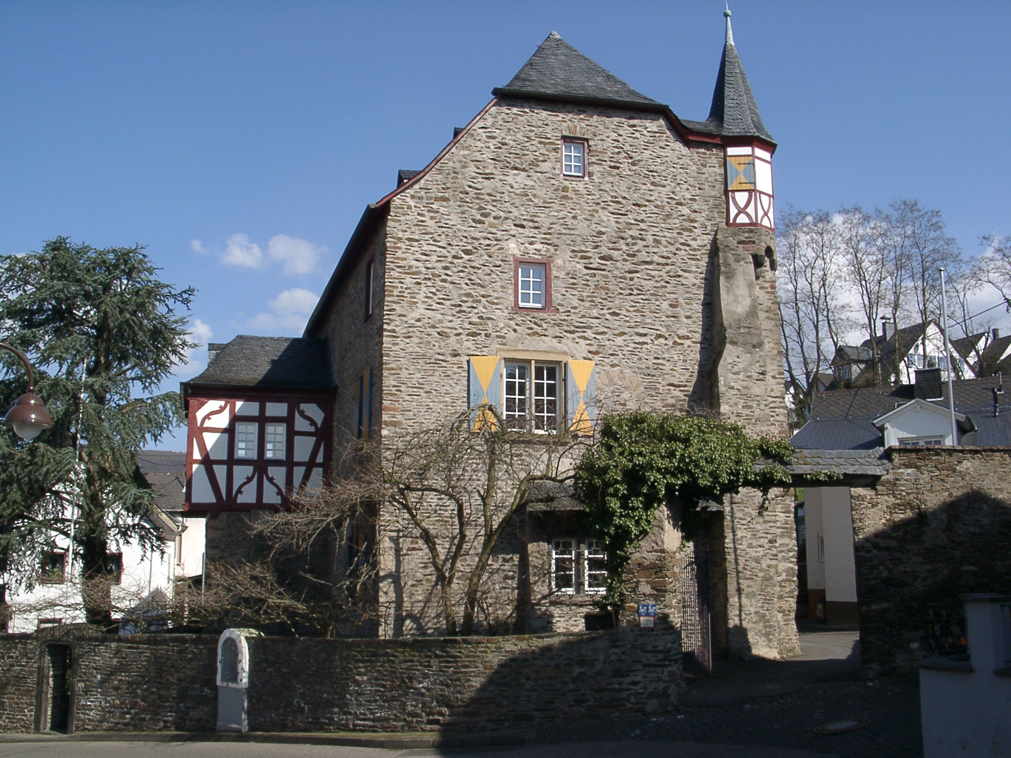 Burghaus "Heesenburg" in Dieblich - selbst fotografiert (Klaus Graf) 23.3.2005 - Lizenz:CC-BY